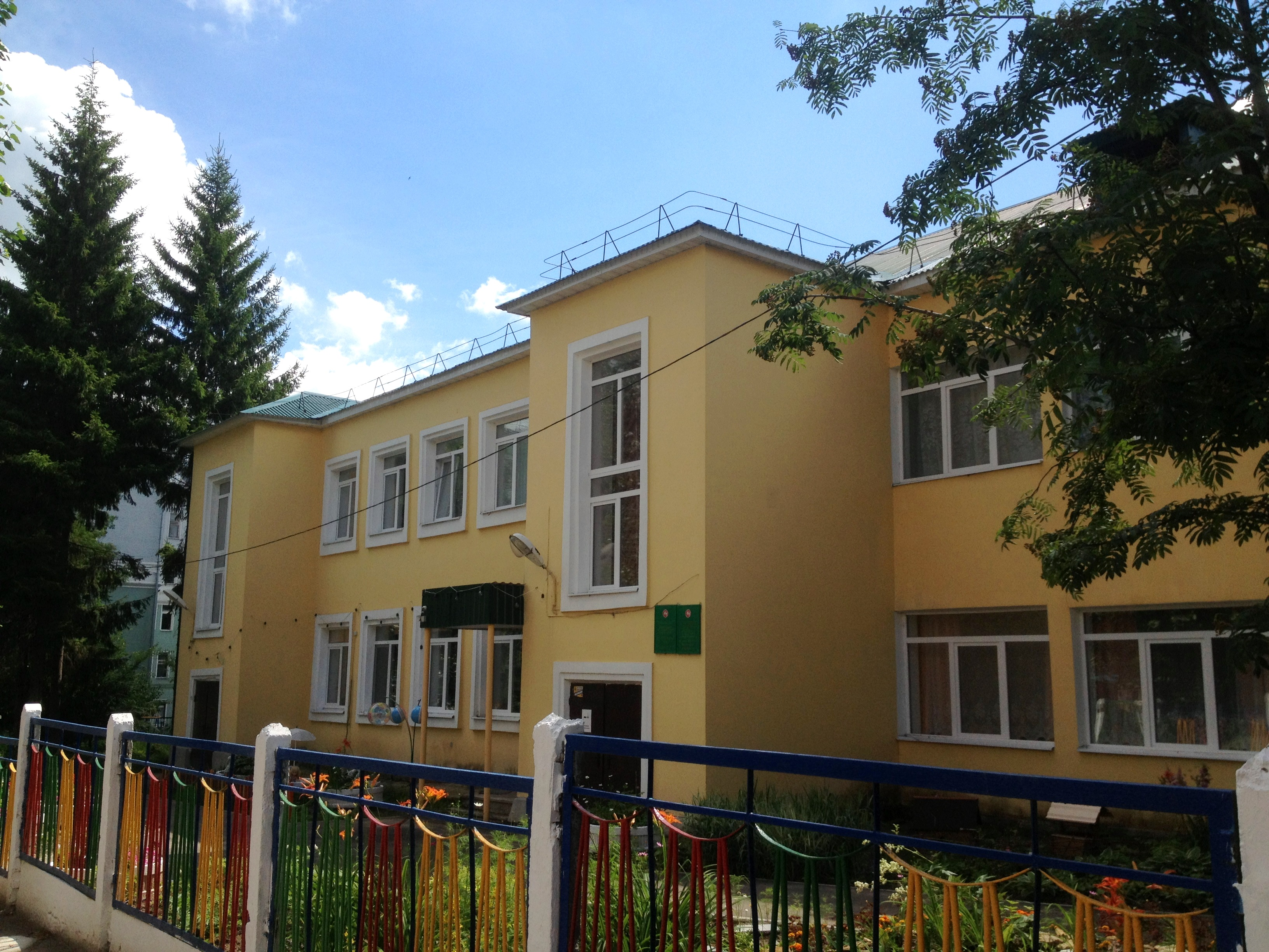 Здание МБДОУ «Детский сад № 36» Авиастроительного района города Казани (ул. Лядова, д. 3).